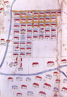 Plano de la Villa de Nuestra Señora de Medellín 1791. Colombia.